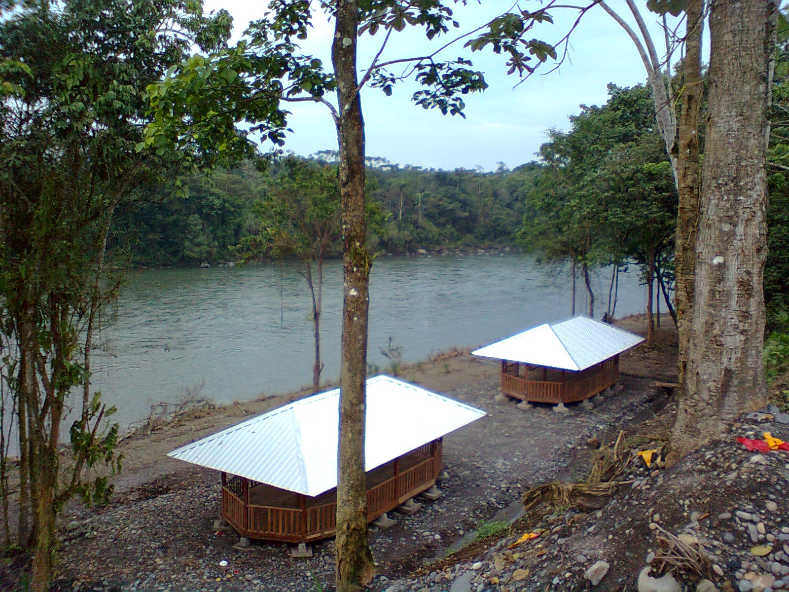 Vista panotamica del balneario del Rio Llushin, en la Comunida del mismo nombre, ubicado a 25 minutos desde Palora, ha sido rehabilitado y regenaro para las festividades de Carnaval 2014, gracias al Alcalde Ing. Luis Heras Calle.